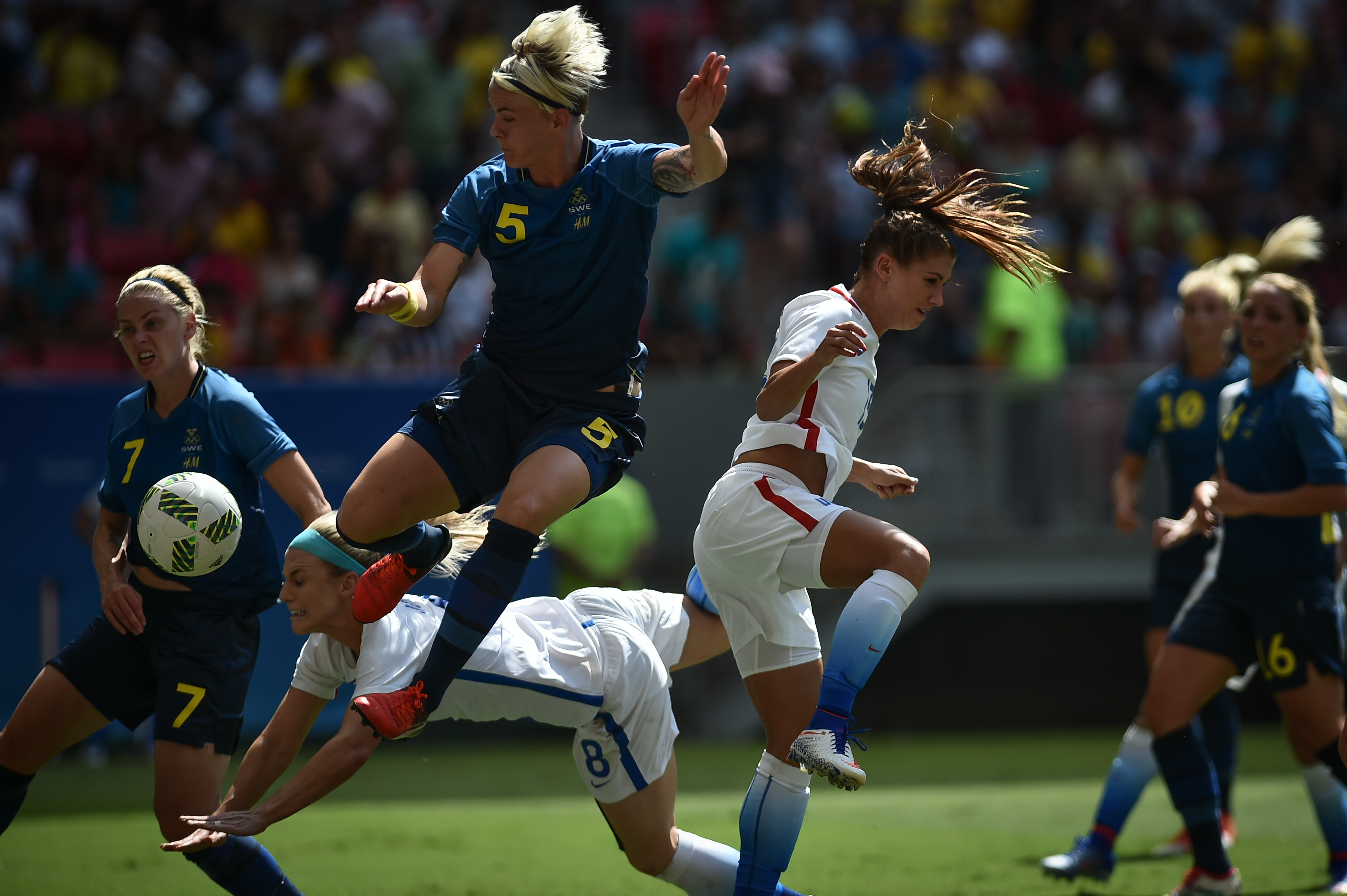 Estádio Nacional de Brasília Mané Garrincha, Brasília, DF, Brasil, 12/8/2016 Foto: Andre Borges/Agência Brasília Estados Unidos e Suécia jogam nesta sexta-feira (12), no Estádio Mané Garrincha, pelas quartas de final do futebol feminino na Olimpíada 2016.